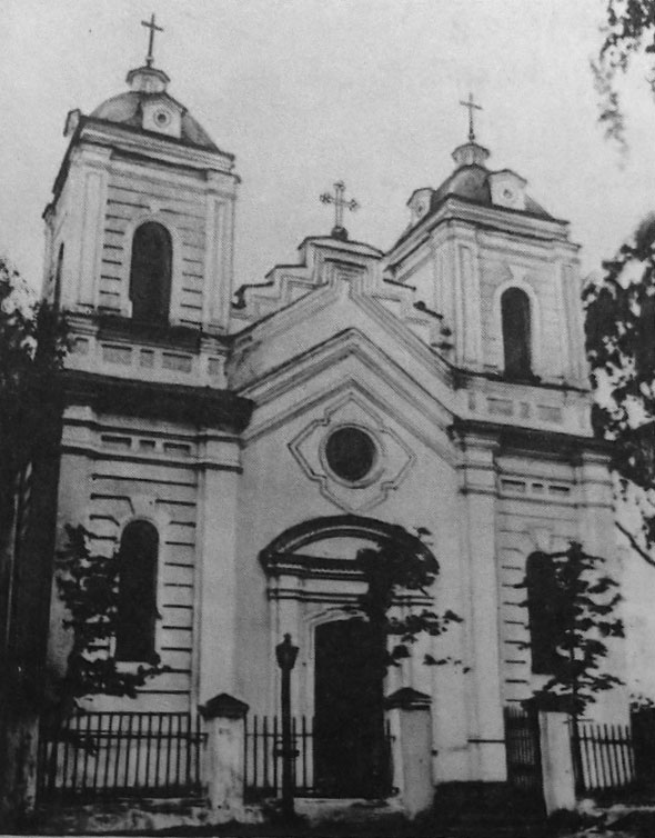 Беларуская (тарашкевіца): Радамля (Радамля)